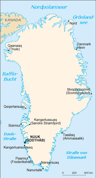 Karte von Grönland